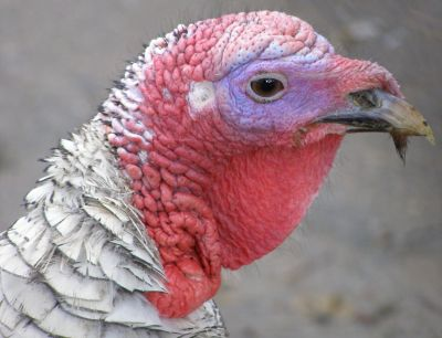 Domesticated Meleagris gallopavo